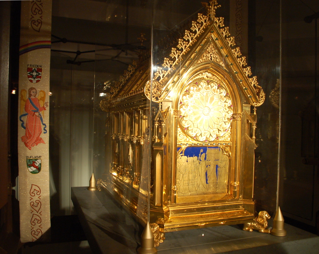 Ida-Schrein in der Krypta der St. Idakirche in Herzfeld (Westf.)